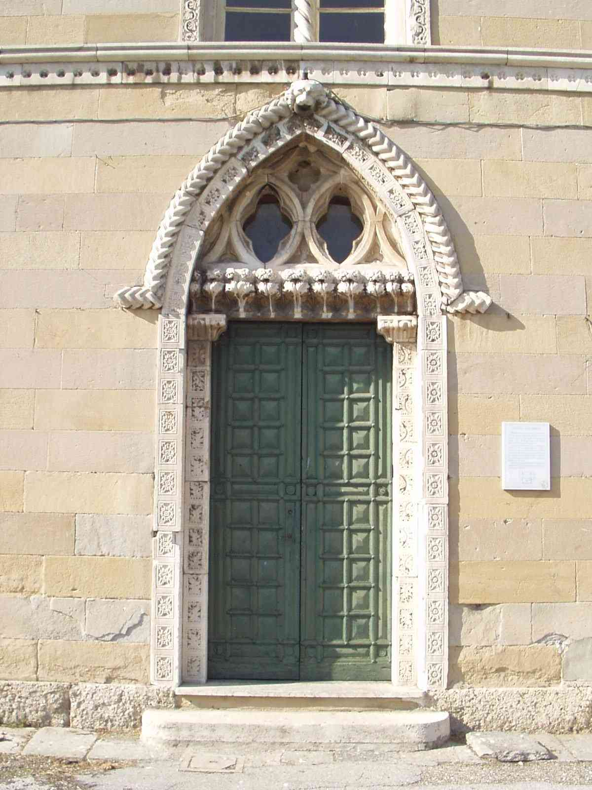 MB Monza Parco della Villa Reale cascina San Fedele ingresso realizzato con materiale di spoglio della chiesa di Brera opera di Balduccio da Pisa